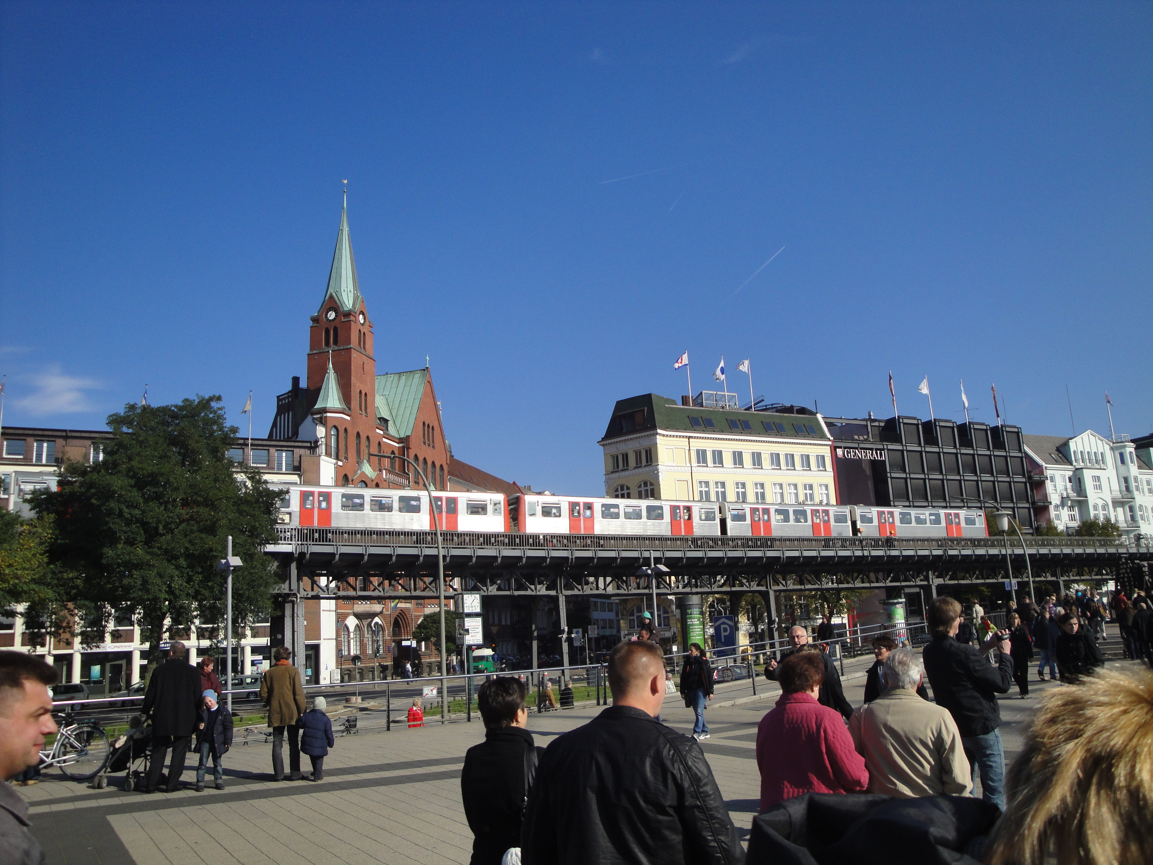 U-Bahn bei den Landungsbrücken in Hamburg in Höhe der Straße Johannisbollwerk.